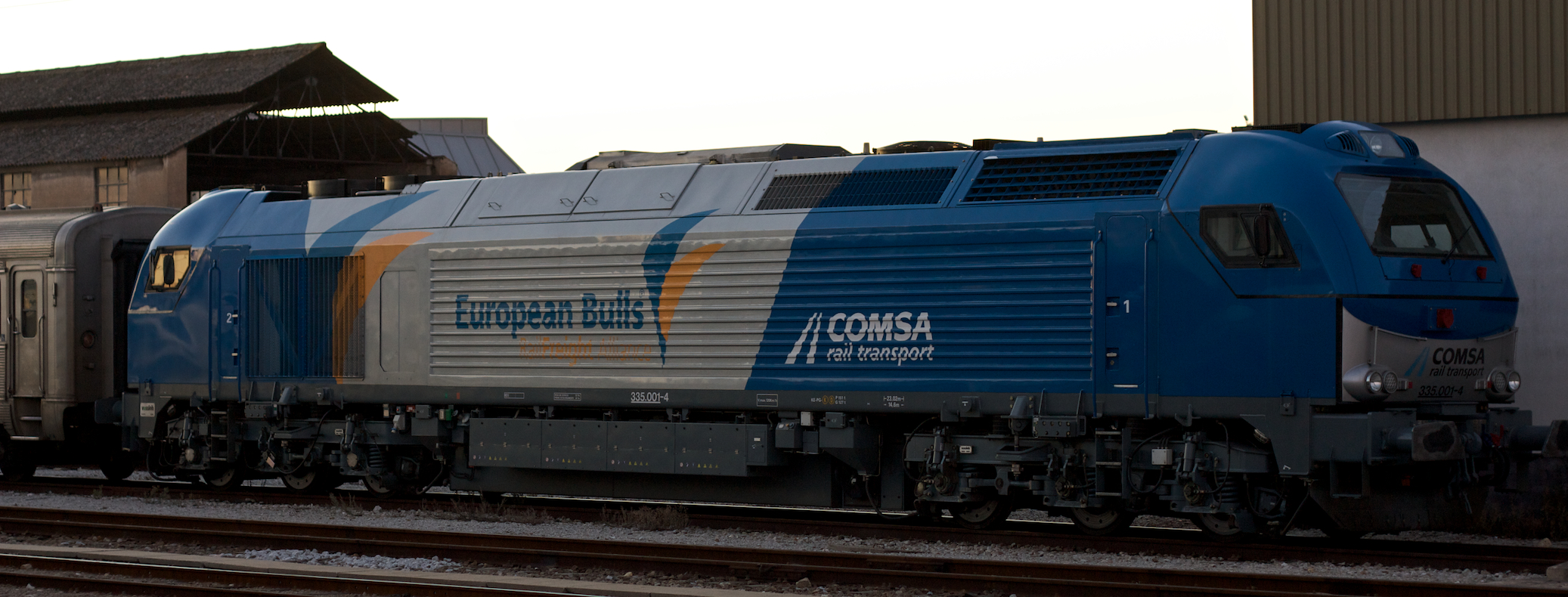 Local: Estação do Entroncamento [Linha do Norte, PK 106 • Linha da Beira Baixa, PK 106]. Data e hora: 20 de Dezembro de 2008 [17h17]. Material: Locomotiva 335.001 [Vossloh]. European Bulls.